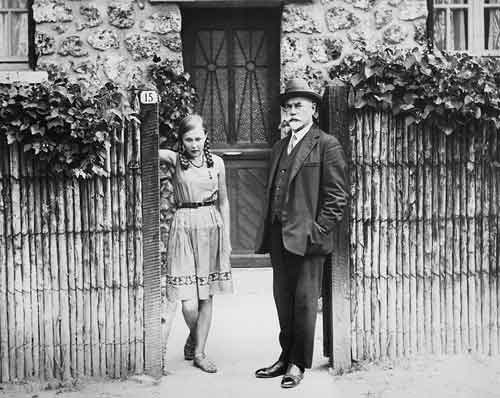 Генерал Деникин и его дочь Марина во Франции, Севр, 1933 год